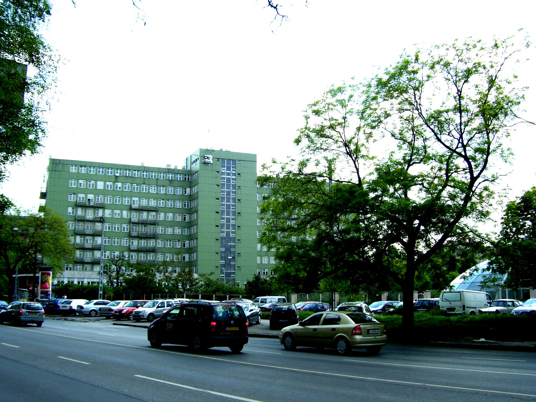 Péterfy Sándor utcai baleseti kórház (Fiumei út), Budapest